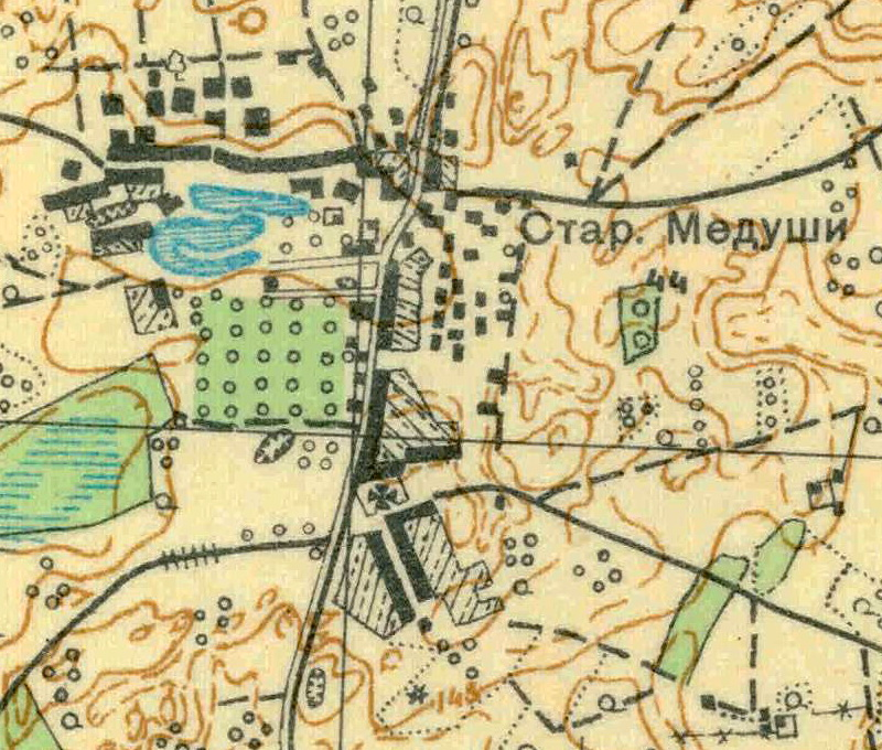 Топографическая карта Ленинградской области, квадрат О-35-11-Г-г (Муховицы), деревня Старые Мёдуши.